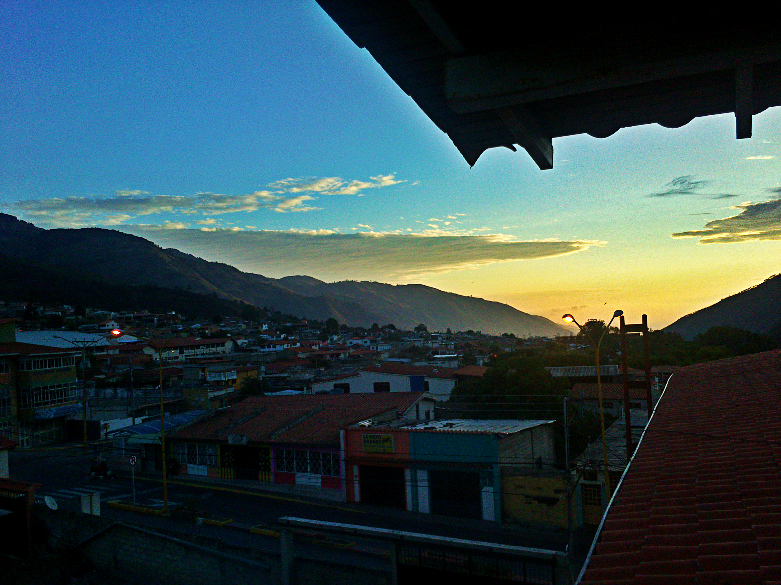 Observando salida del Sol en el Bailadores Estado Mérida